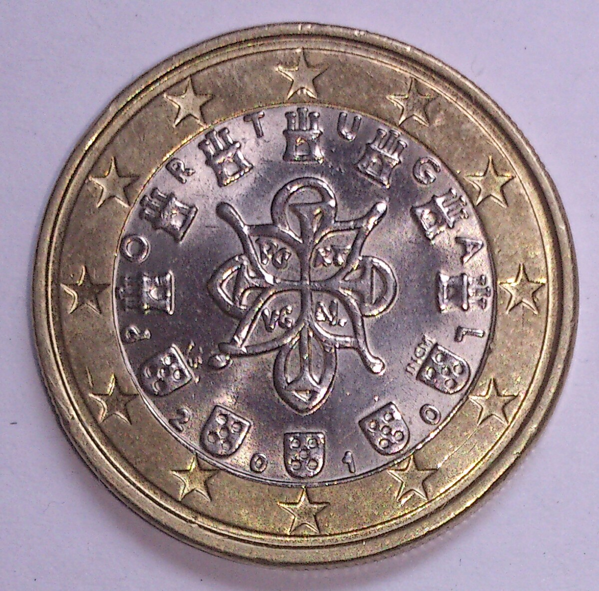 Moneda de 1 euro de Portugal